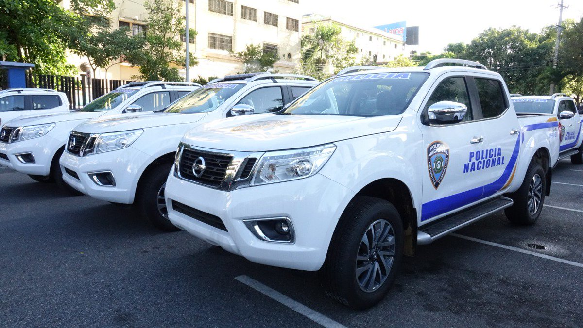 Vehículo de la Policía Nacional de la República Dominicana